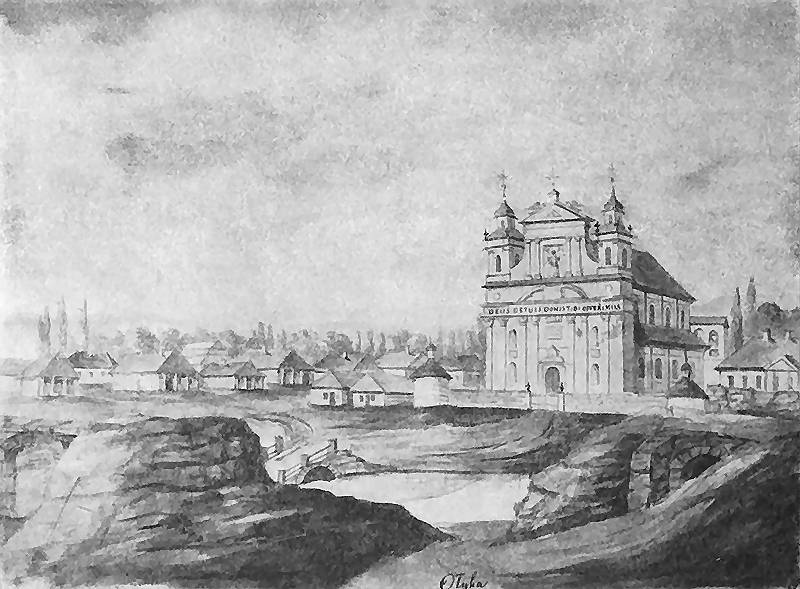 OŁYKA. Kolegiata p.w. Św. Trójcy. Widok fasady i elewacji bocznej. Kościół trzynawowy, z dwiema niskimi wieżami, szczytem ze spływami i trójkątnym przyczółkiem w fasadzie; za kościołem arkadowa dzwonnica; cmentarz kościelny otoczony kamiennym murem z kaplicami w narożach; z prawej strony parterowy budynek z gankiem; z lewej drewniane, parteowe domy z podcieniami. Napis: Ołyka; napis na podkładzie: Wołyń. Ołyka, - kościół parafialny. 1874. Rys. ołówkiem podmalowany akwarelą. 20,5 x 27,8 cm. Muzem Narodowe, Kraków. III-r.a. 4218 (Teka Wołyń).